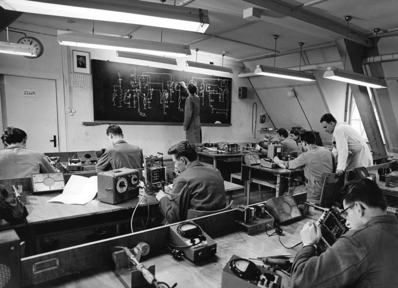 Nürnberg Grundig Radio-Werke Grundig bildet jedes Jahr über 400 Lehrlinge aus. Hier folgen wir dem Unterricht der jungen Radiotechniker in der elektrischen Lehrwerkstatt.